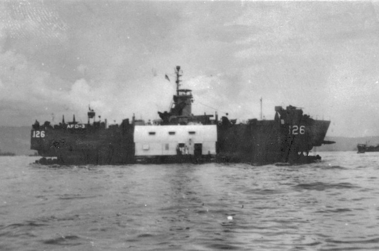 USS AFD-3